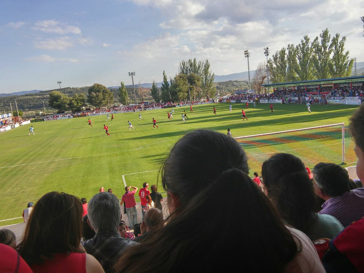 CD.Calahorra 1 vs 0 Gimnastica Segoviana (2015)